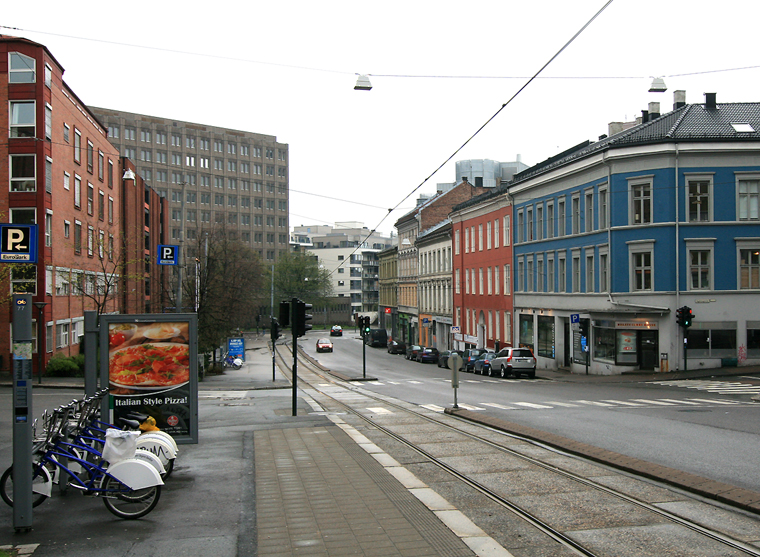 Pilestredet, Oslo, sett fra Frydenklundkvartalet mot St. Olavs gate